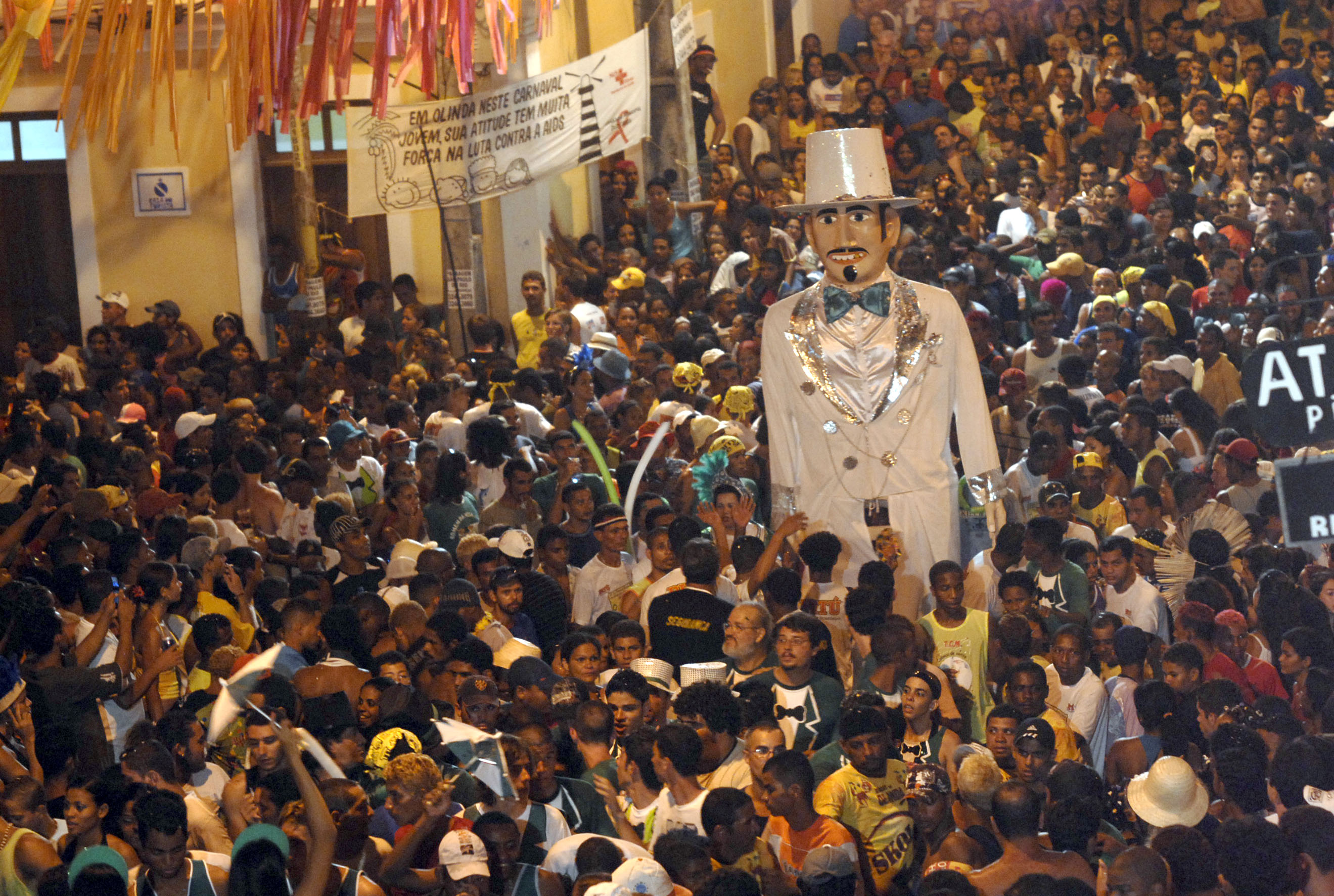 Homem da meia-noite, Carnaval do Olinda, Pernambuco, Brazil